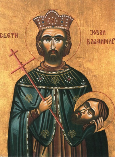 Jovan Vladimir, medieval fresco